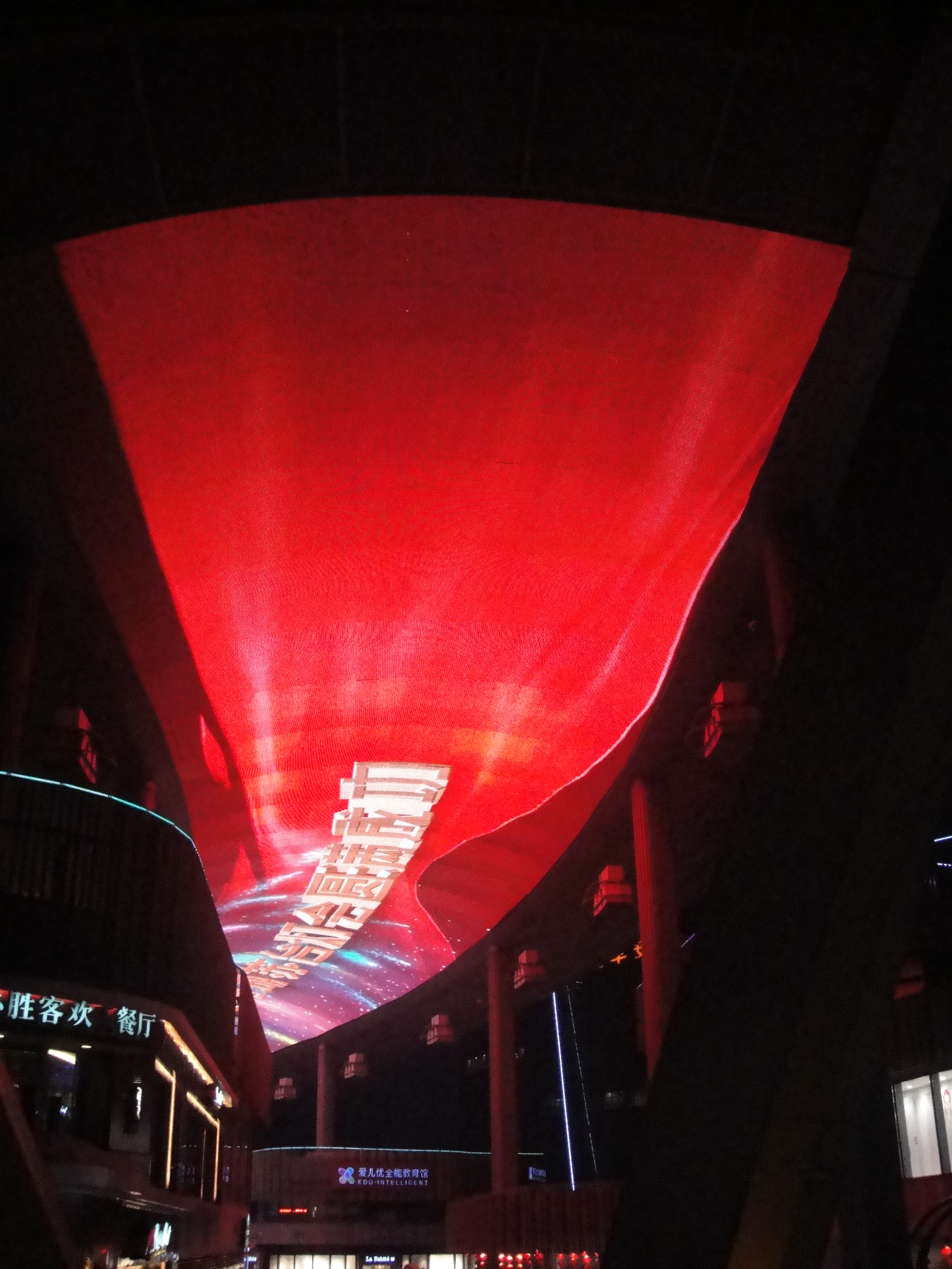 圆融时代广场天幕